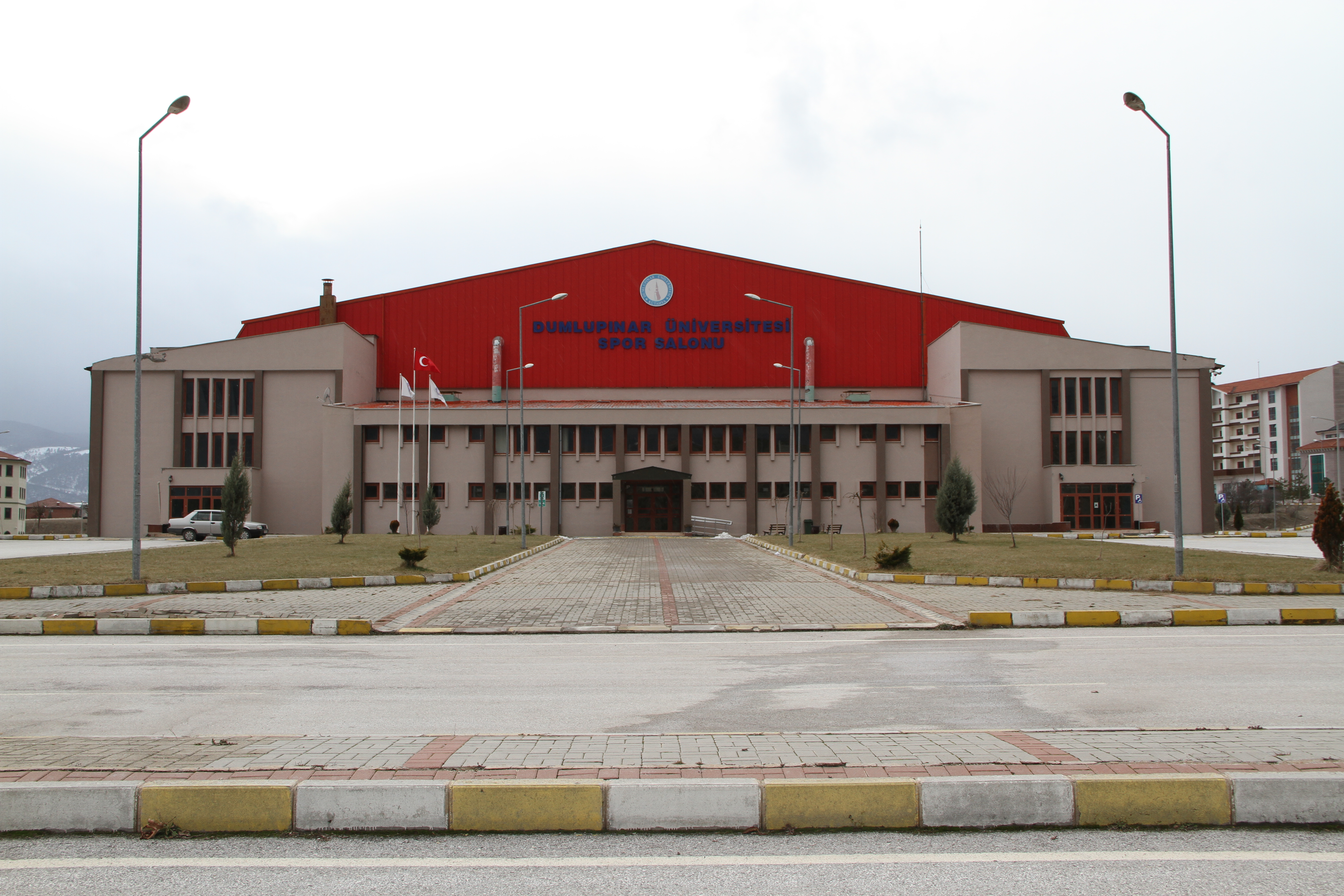 DPÜ'nün Evliya Çelebi Yerleşkesi'ndeki Kapalı Spor Salonu